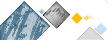 Imagen para dar color al articulo